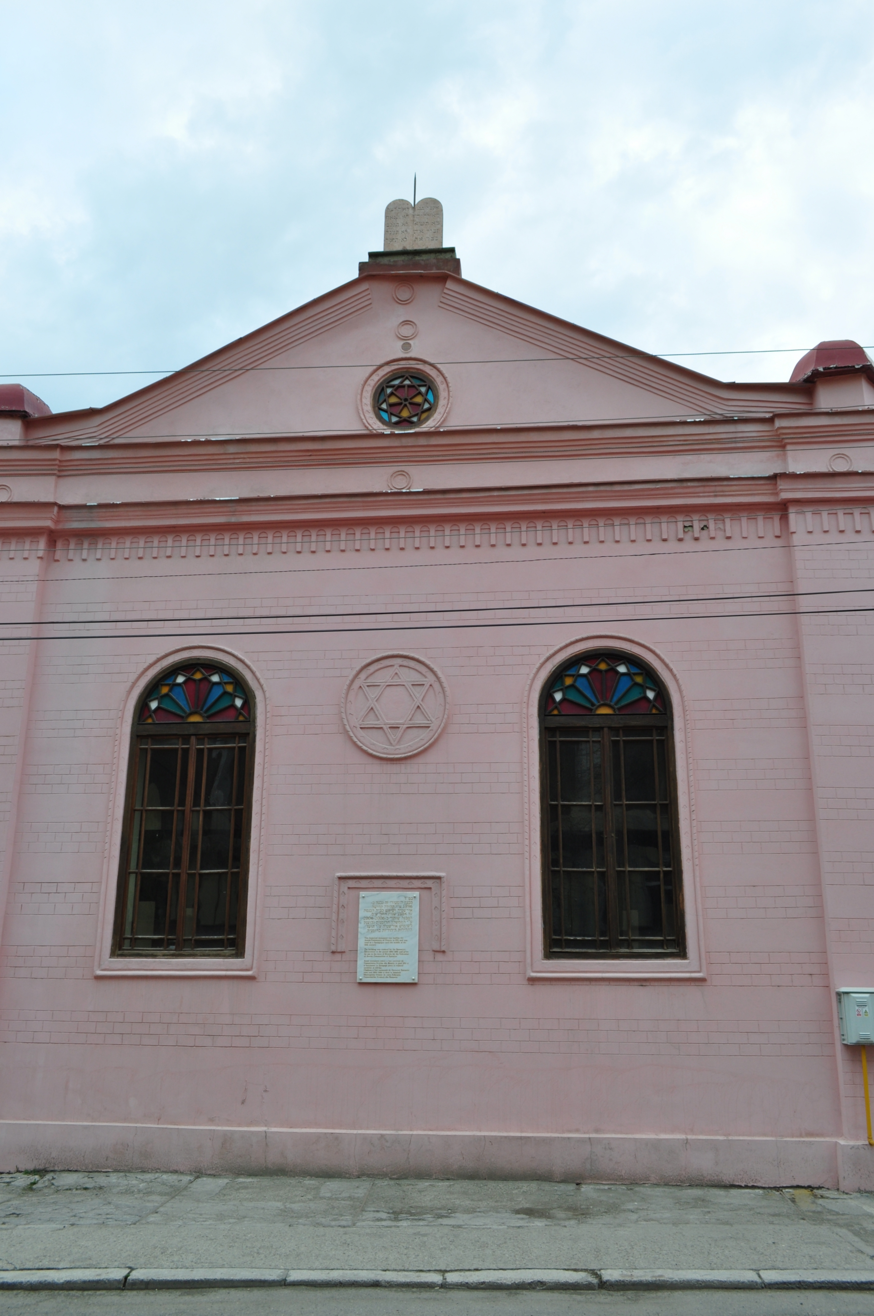 Sinagogă